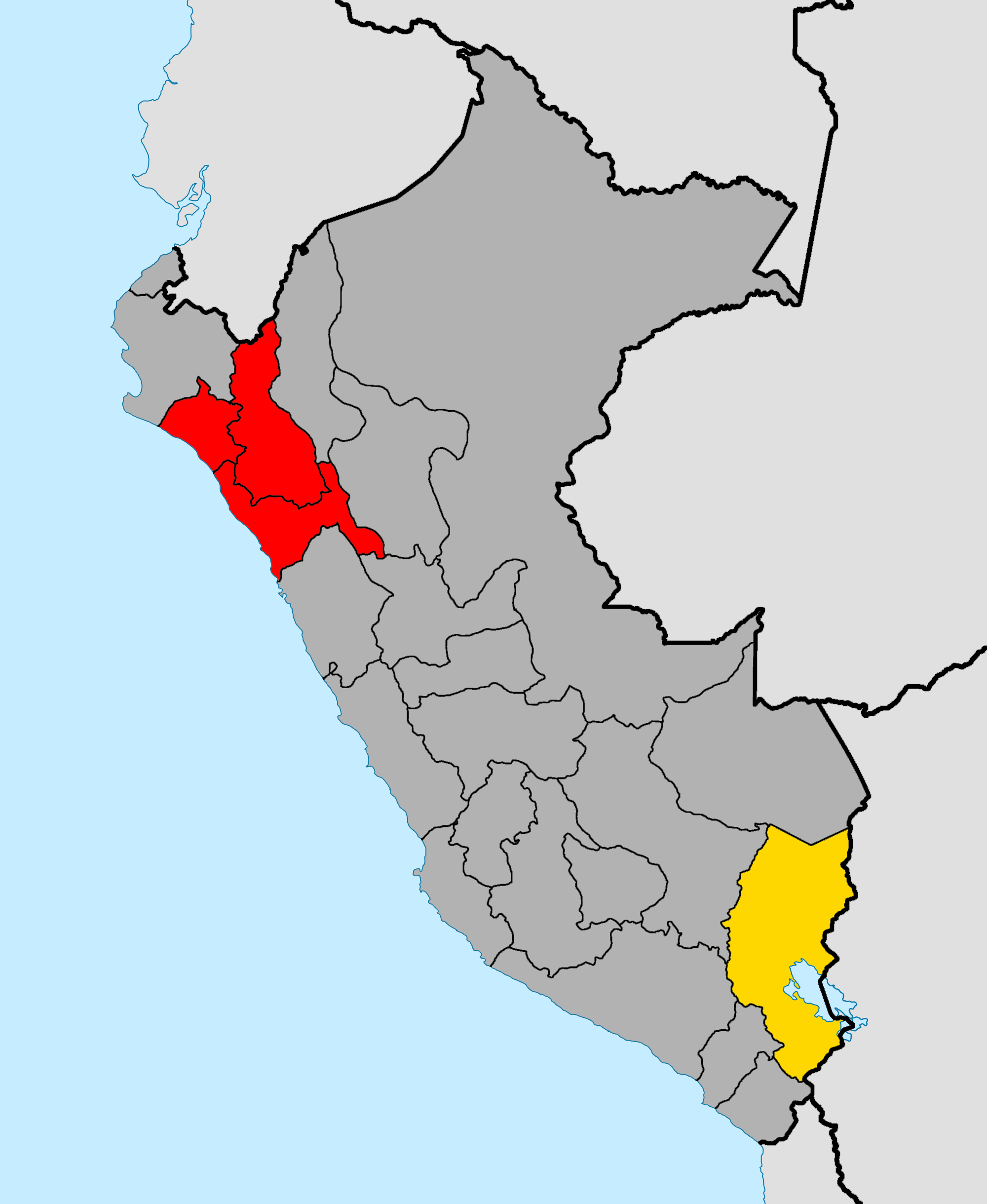 Candidato vencedor por departamento: en gris Accion Popular, en rojo APRA, en amarillo FRENATRACA